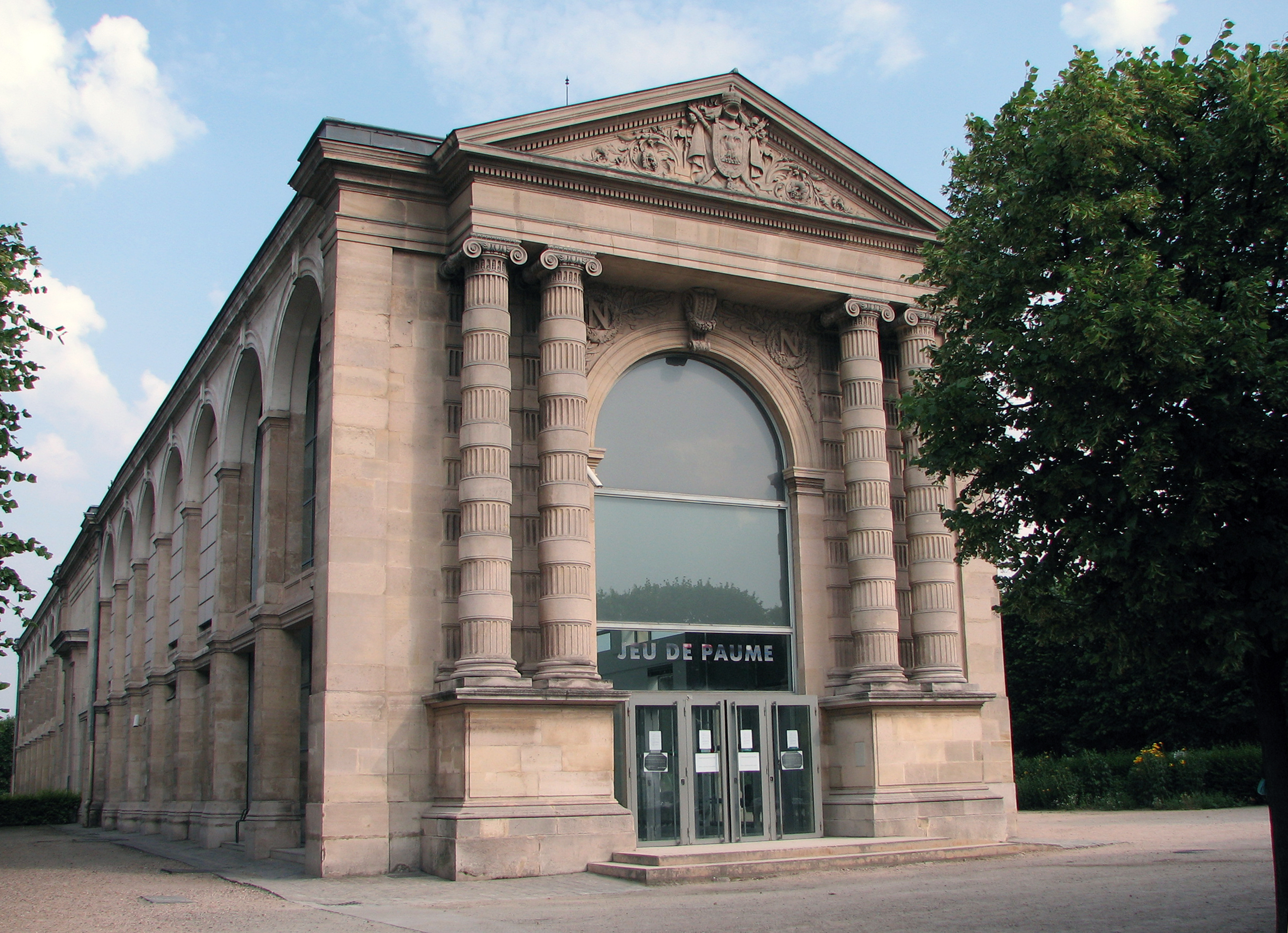 Jeu de Paume, jardin des Tuileries, à Paris Jeu de Paume, Tuileries gardens, Paris